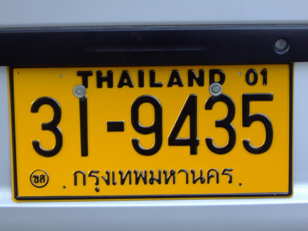 Corriera thailandese - targa Foto Propria